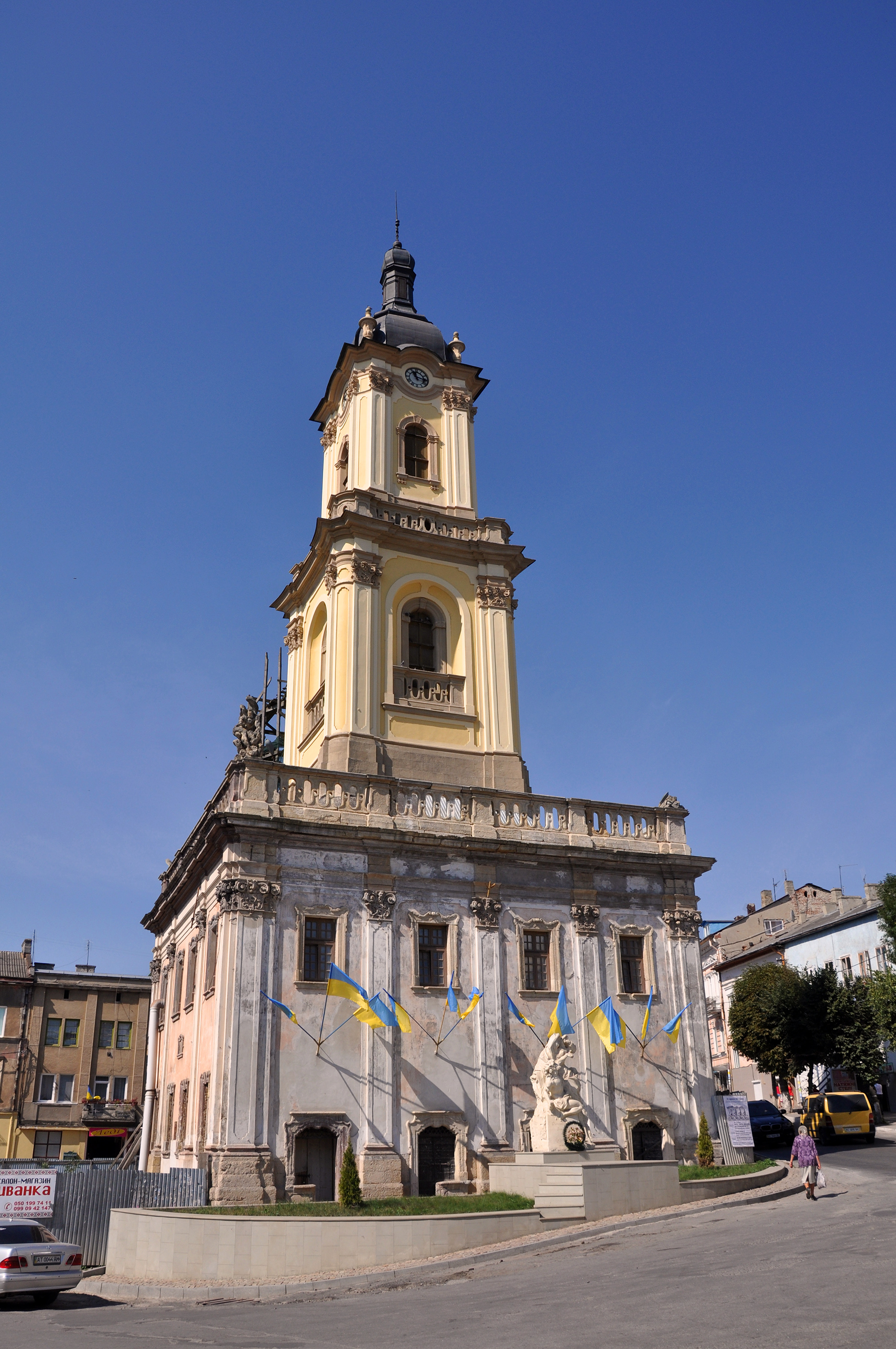 Ратуша (мур.), Бучач, майдан Волі